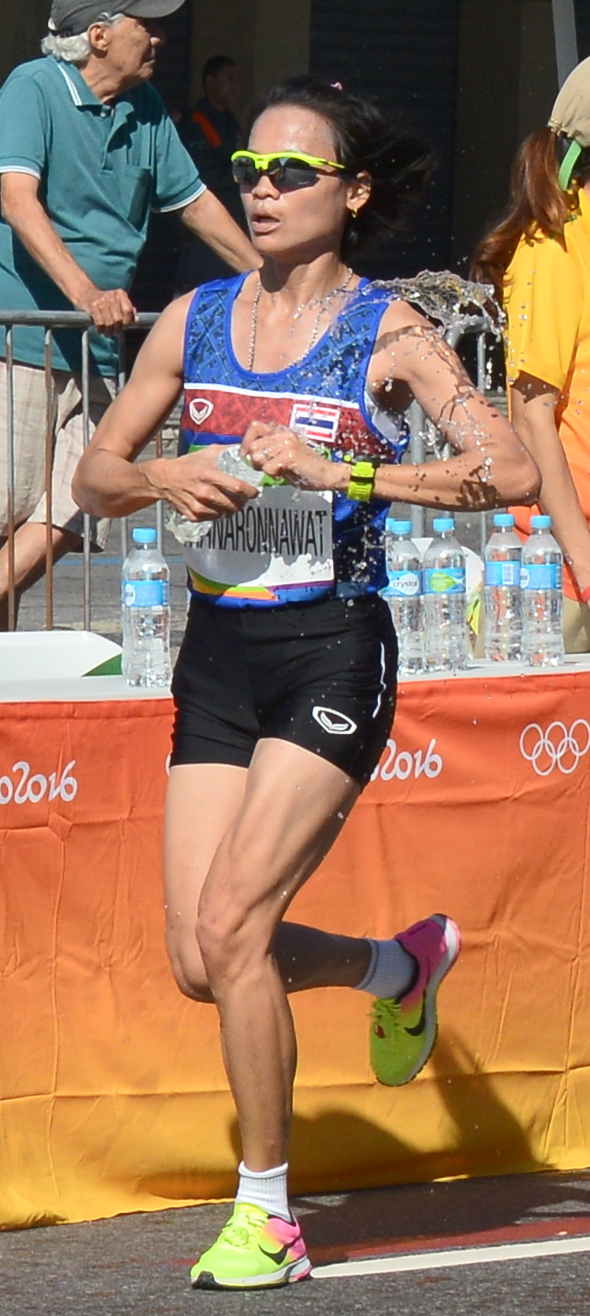 Passage du marathon des jeux olympiques de Rio 2016 dans le centre de Rio